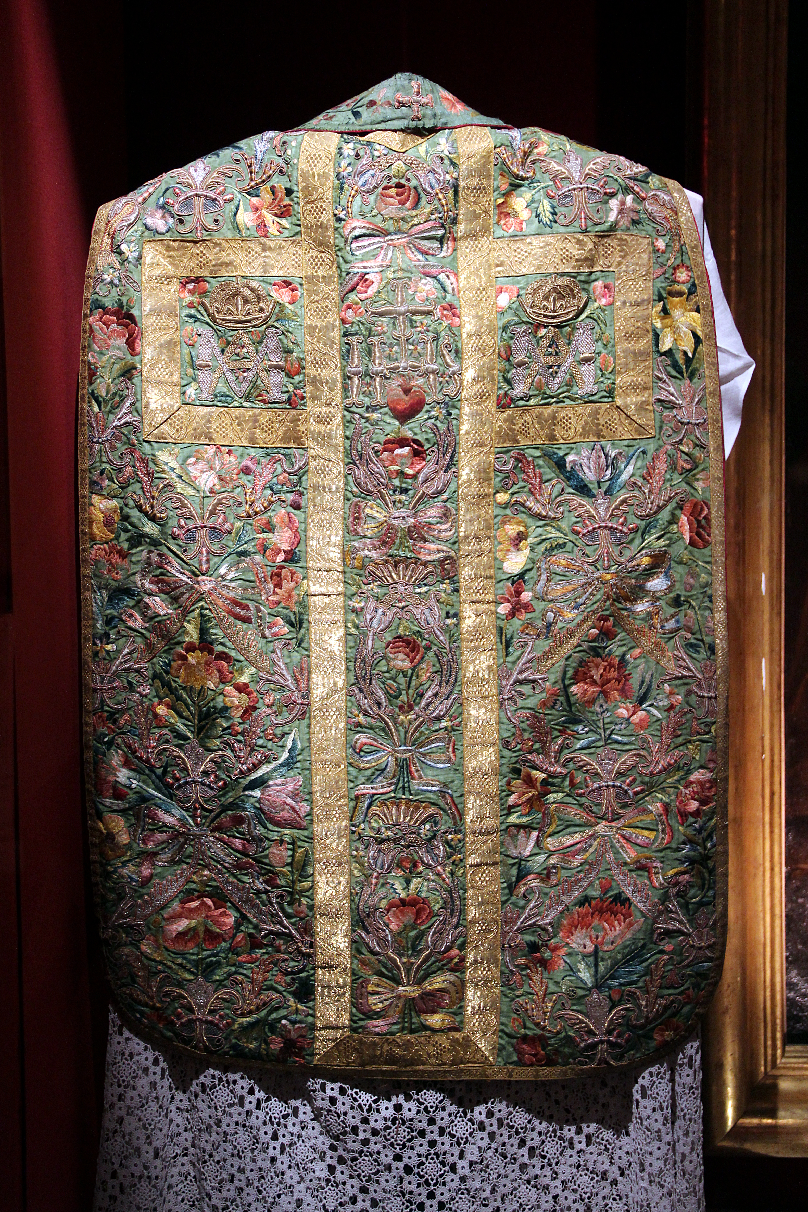 Chasuble brodée du XVIIe siècle faisant partie des collections du château de Vaux-le-Vicomte - Maincy (Seine-et-Marne, France).